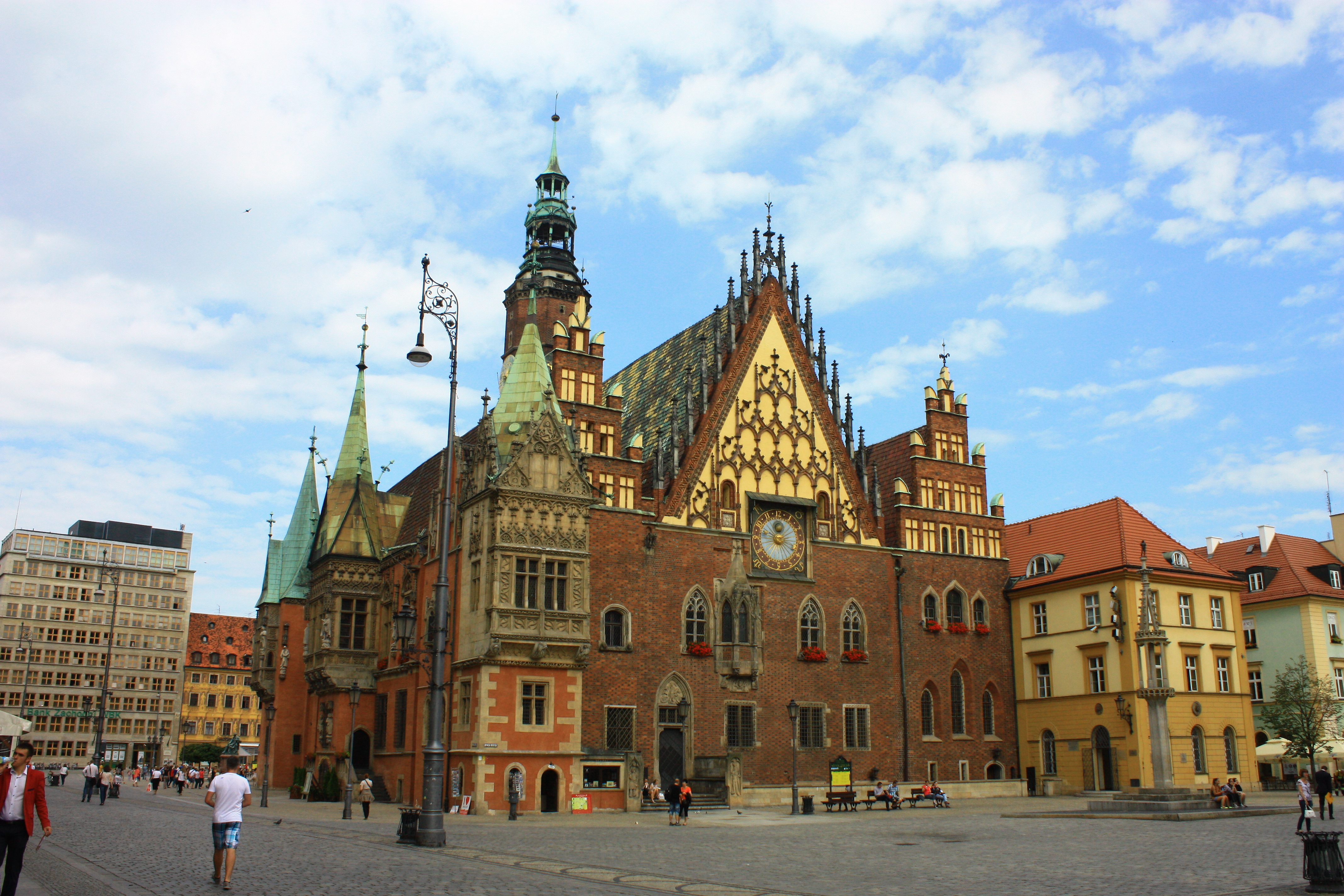 Wrocław, Ratusz Staromiejski